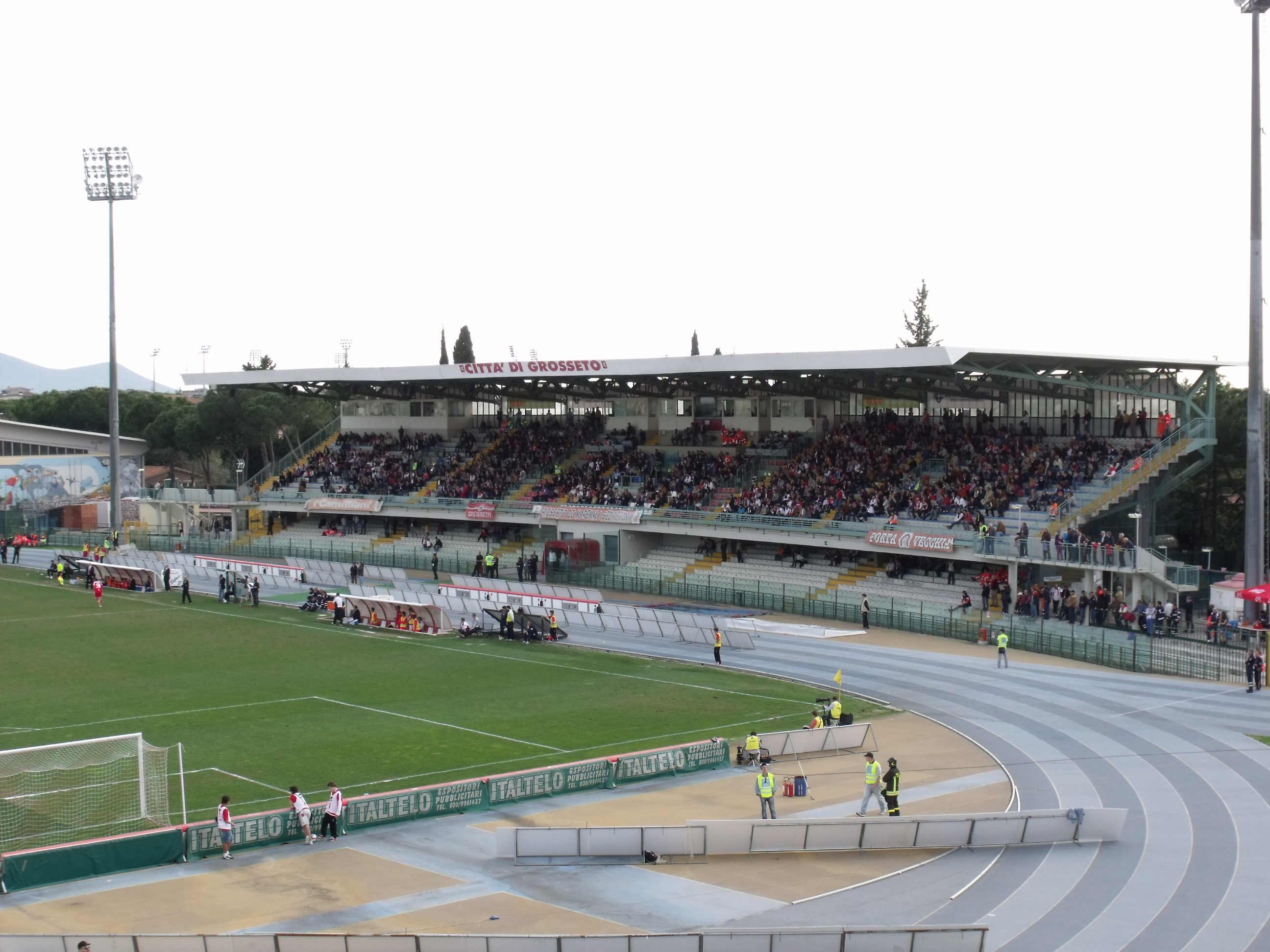 Haupttribüne des Stadio Carlo Zecchini in Grosseto